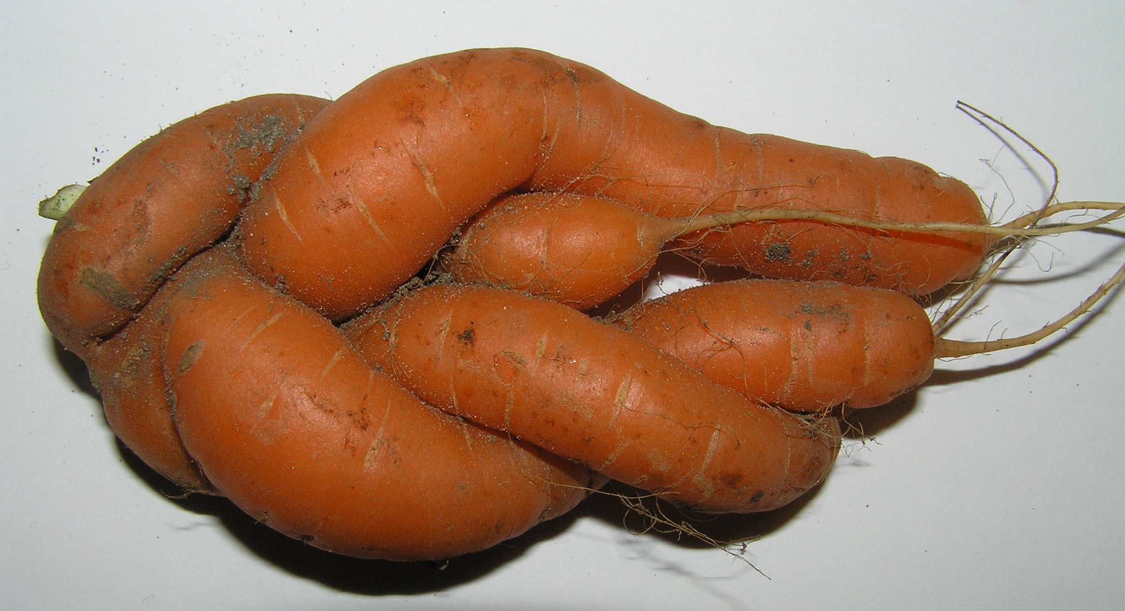 A funny carrot